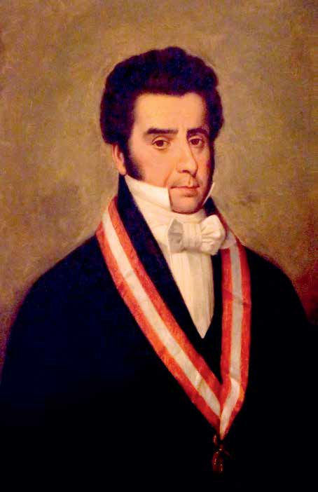 Manuel Lorenzo de Vidaurre y Encalada (1773 – 1841) jurista, político y ensayista peruano. Precursor reformista de la independencia. Presidente del Congreso Constituyente de 1827. Presidente de la Corte Suprema de Justicia.